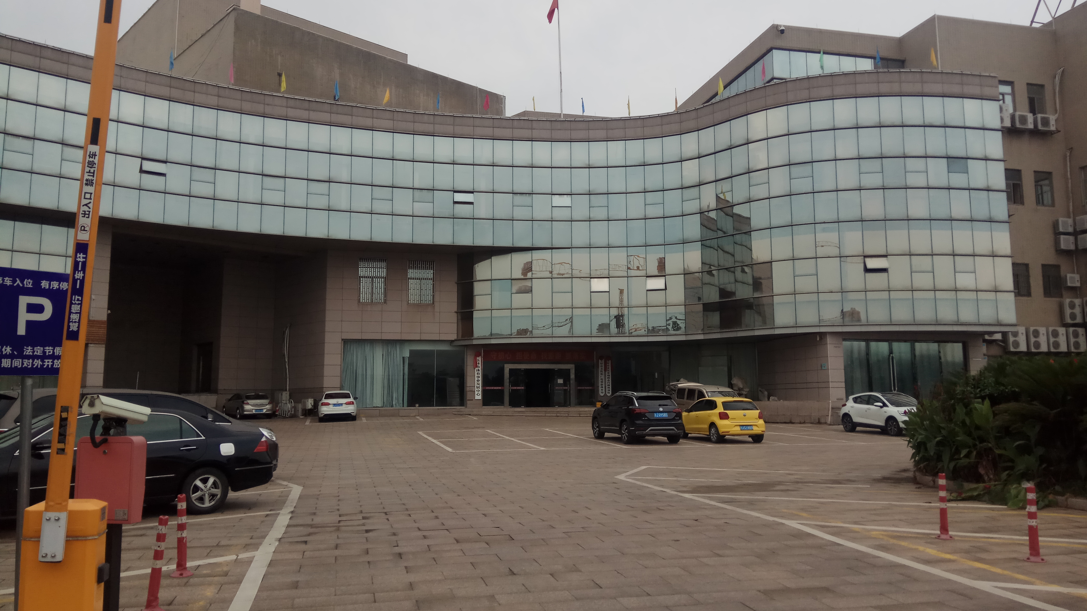 中文（中国大陆）: 玉环市文化和广电旅游体育局